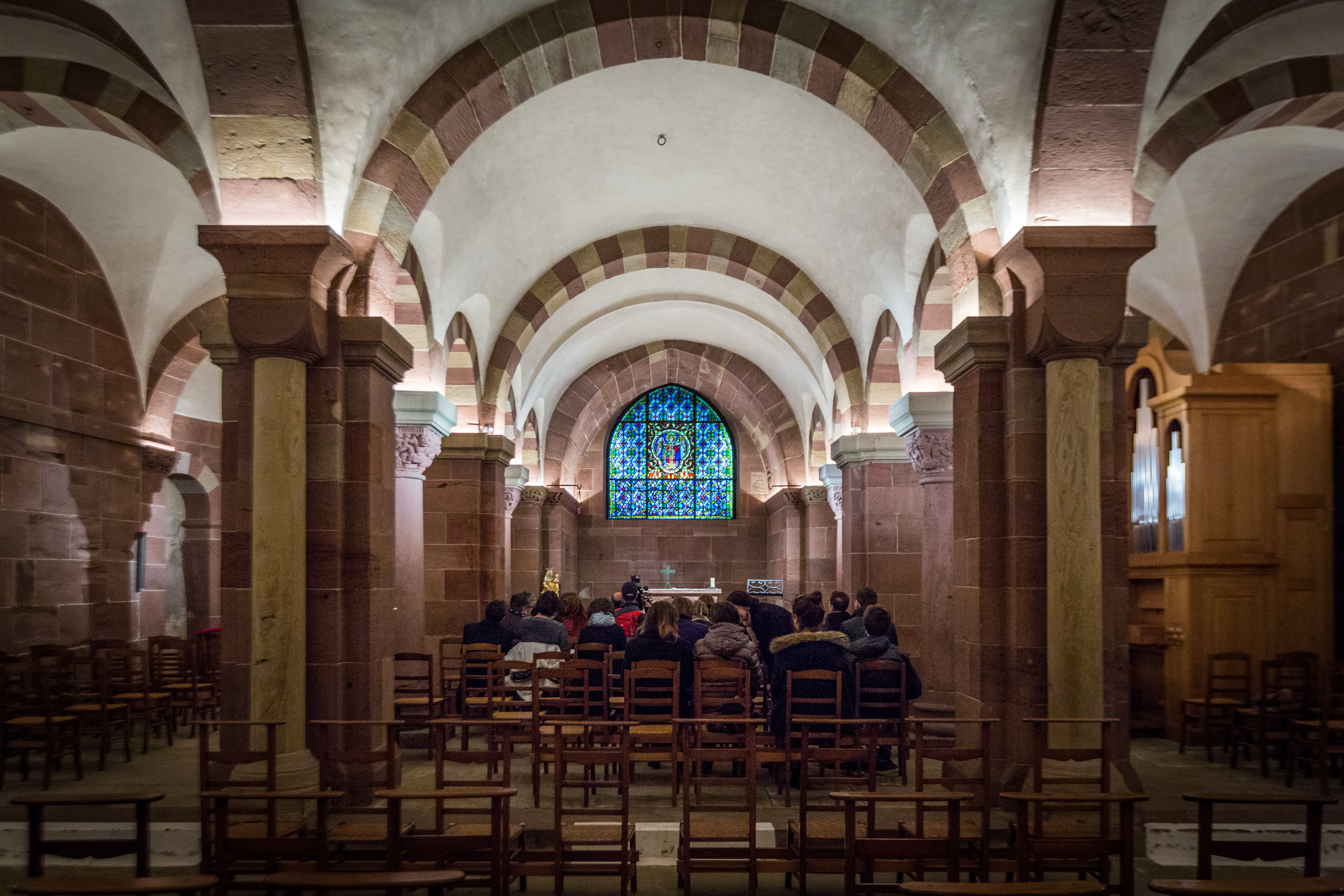 Crypte Cathédrale Notre-Dame de Strasbourg